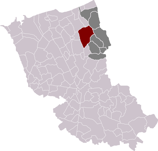 Locatie gemeente Warrem in arrondissement Duinkerke. Zelfgemaakt. Location of Warhem municipality in the arrondissement of Dunkirk. Self made. Localisation de la commune de Warhem dans l'arrondissement de Dunkerque. Fait moi-même.